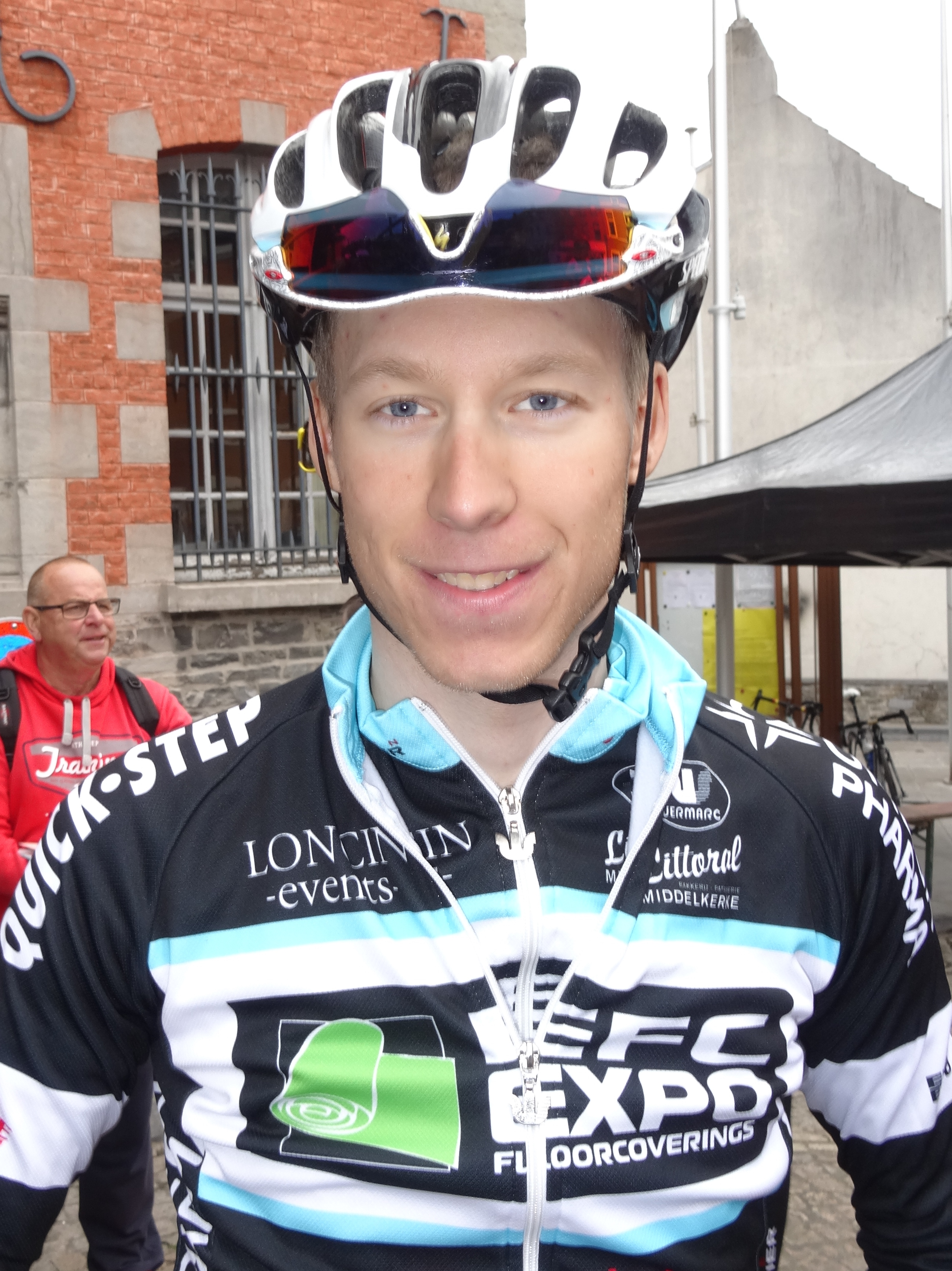 Triptyque des Monts et Châteaux 2014, étape 1, 4 avril 2014, départ d'Antoing. Depicted person: Dieter Bouvry Depicted team: EFC-Omega Pharma-Quick Step The creation of these files was made possible thanks to the organizers of the Triptyque des Monts et Châteaux 2014 English | français | +/−